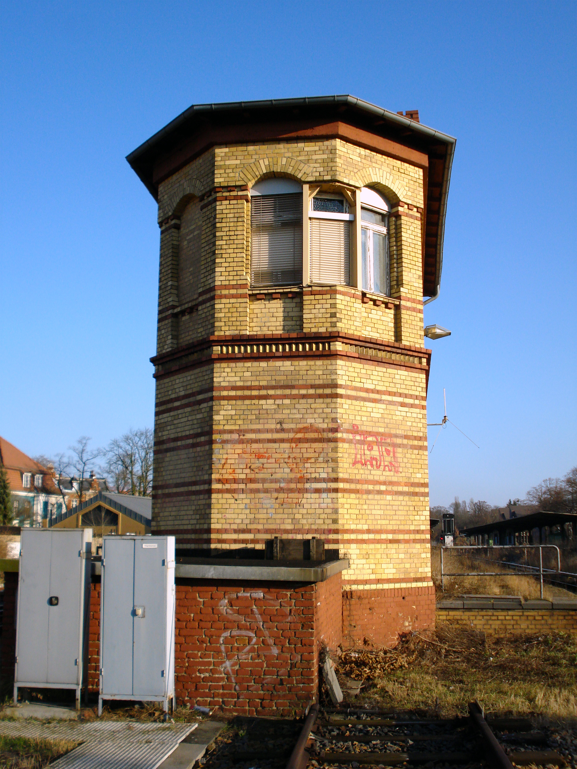 Stellwerk Zfm